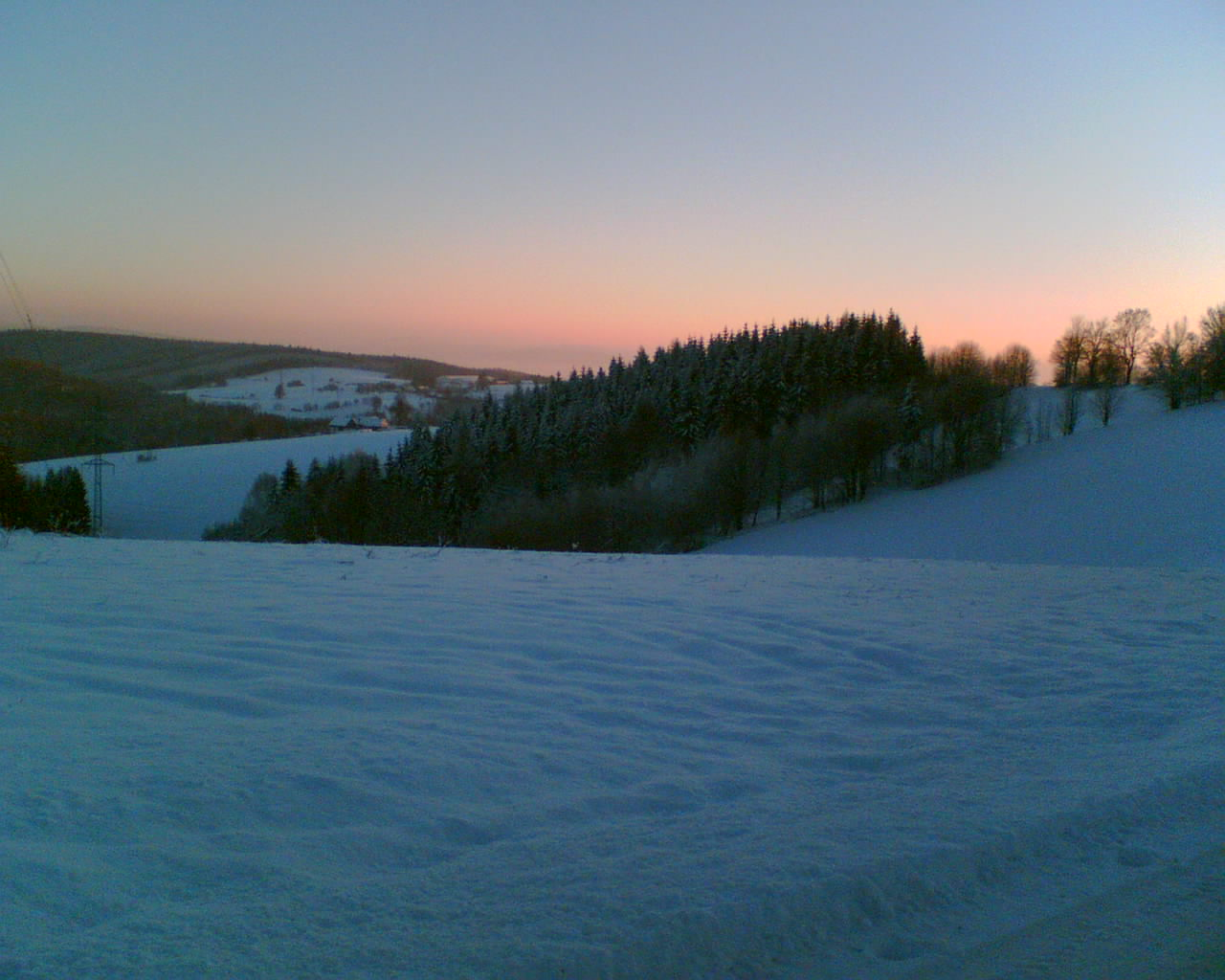 Zima v okolí Cotkytle